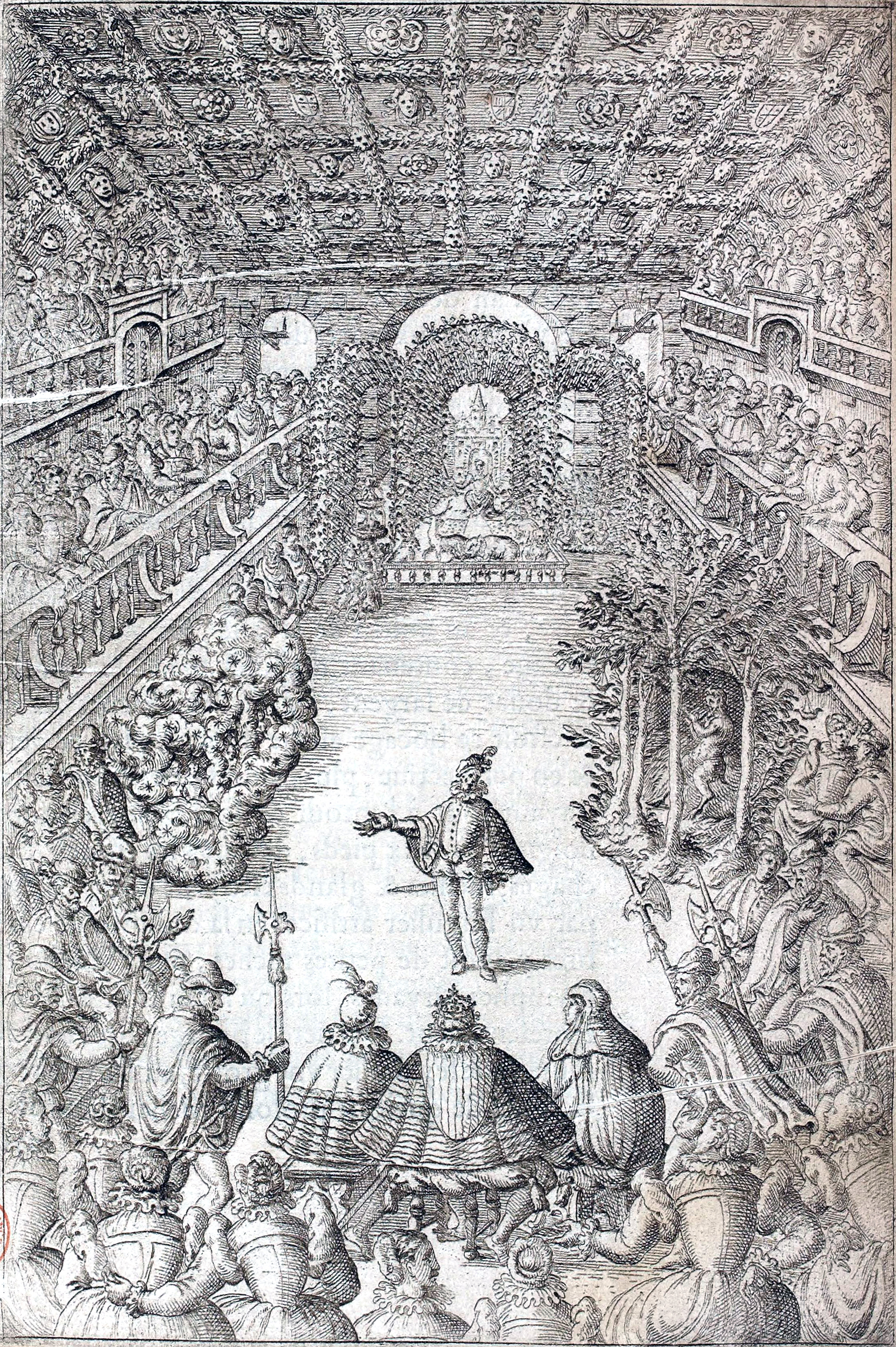 Figure de la Salle, tirée de Balet comique de la Royne, faict aux nopces de monsieur le duc de Joyeuse & madamoyselle de Vaudemont sa soeur. Par Baltasar de Beaujoyeulx, valet de chambre du Roy, & de la Royne sa mere